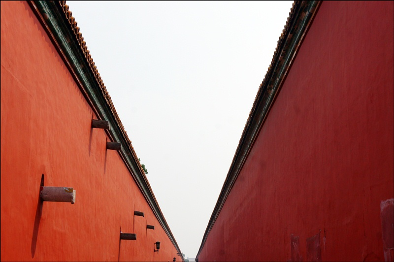 中文（中国大陆）: 故宫博物院内城墙